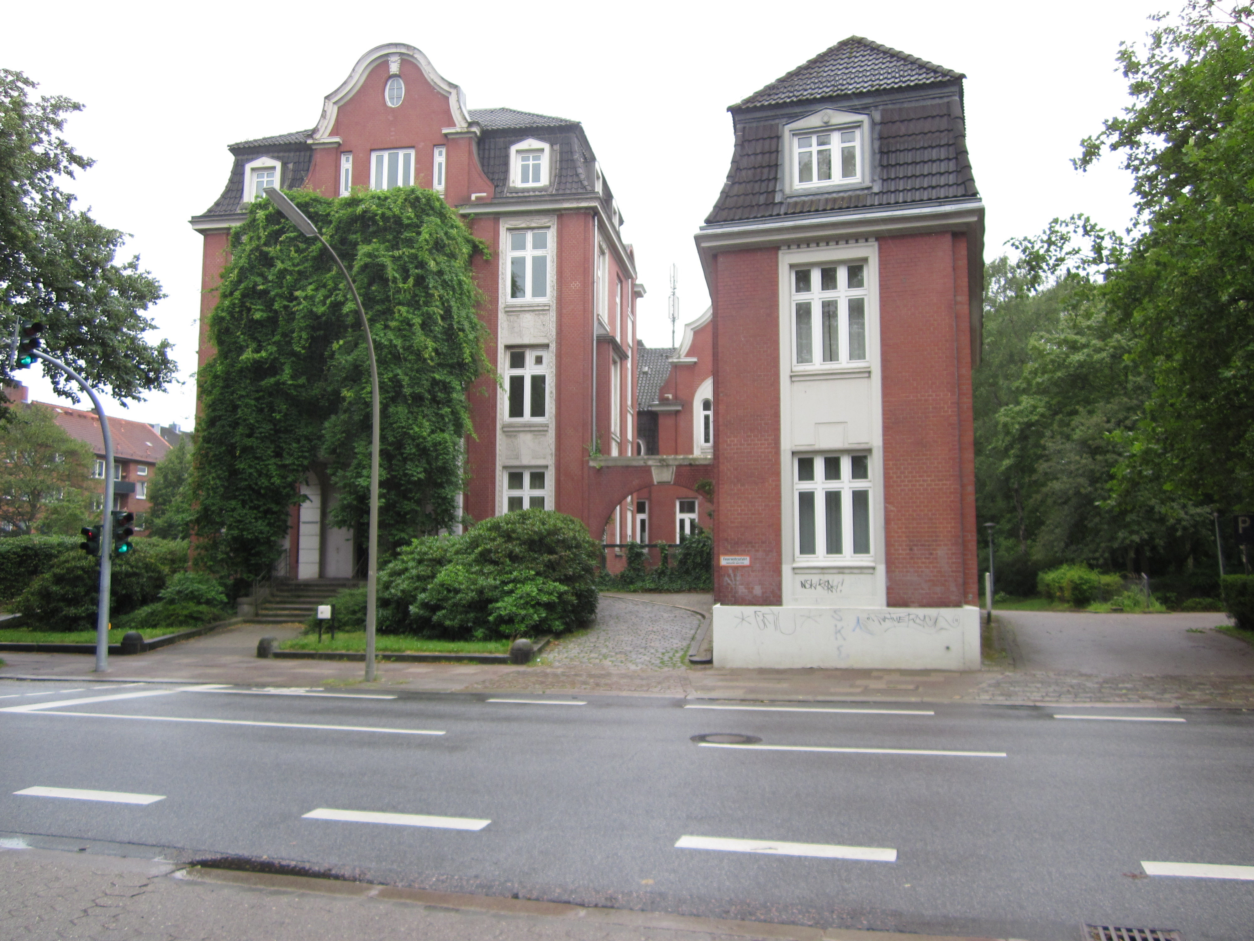 Das ehemalige Ebenezer-Krankenhaus in der Friedrichsberger Straße 53 in Barmbek-Süd steht seit dem 16. August 2006 unter Denkmalschutz. This is a photograph of an architectural monument.